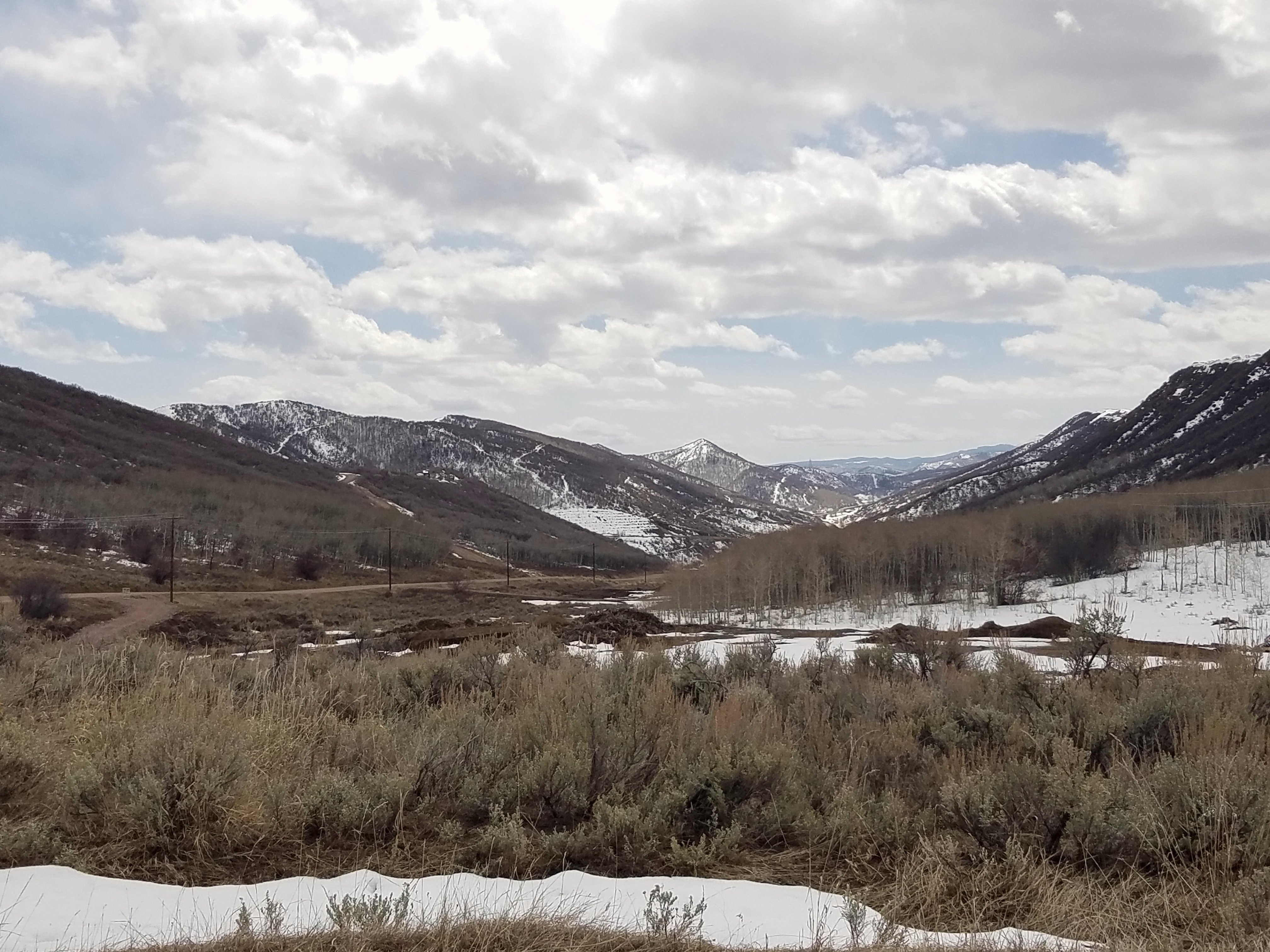 Haybro, Colorado